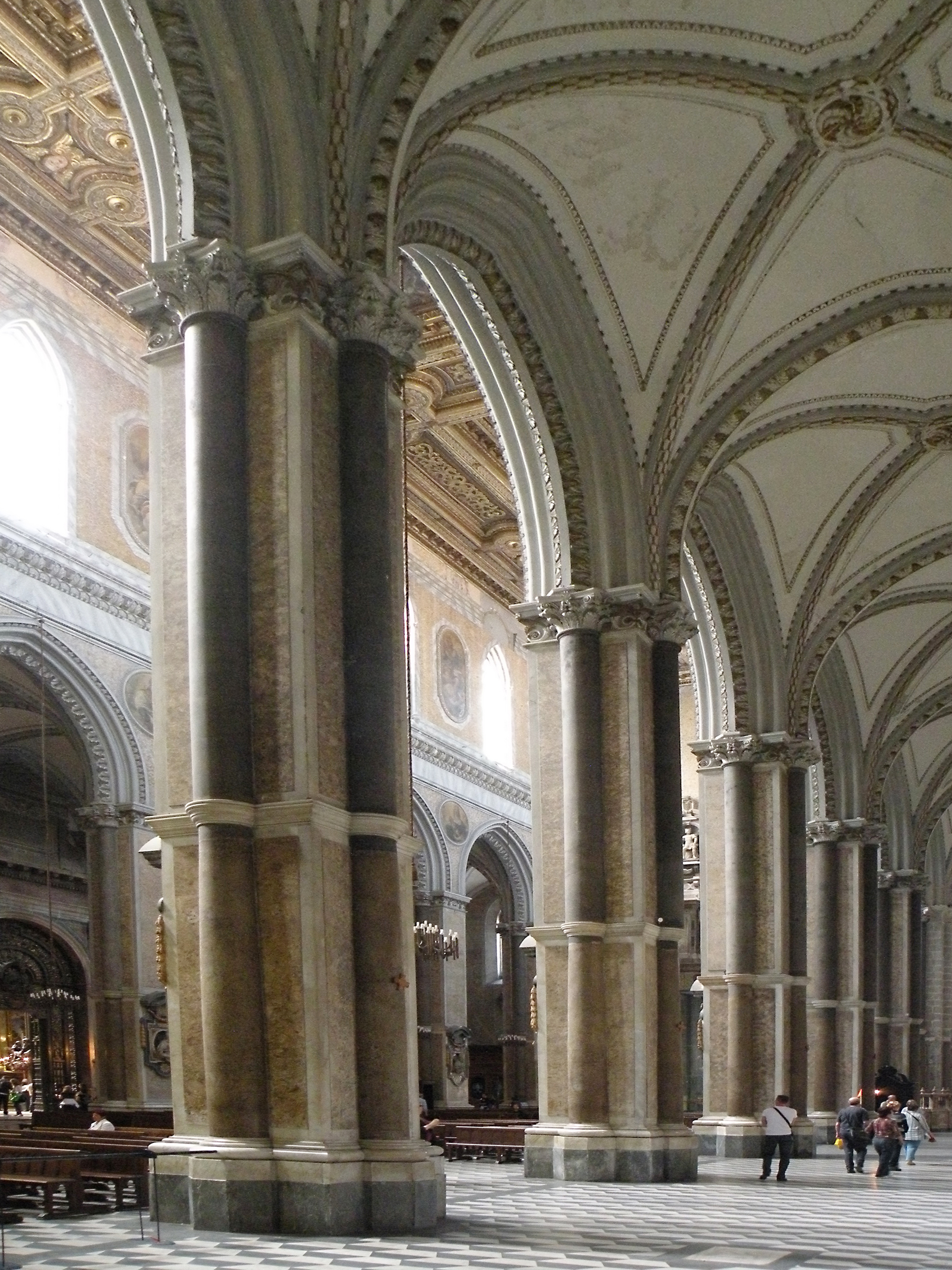 Боковой неф Дуомо